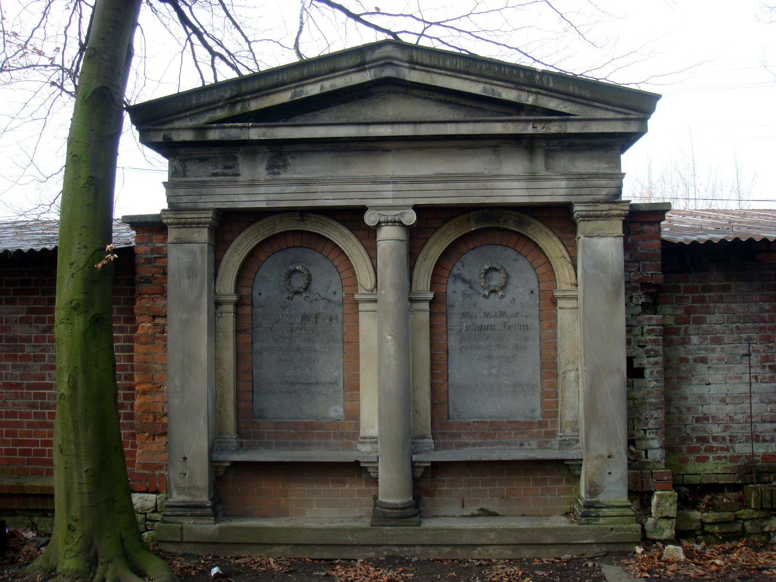 Grobowiec rodziny Farm na cmentarzu ewangelicko-augsburskim przy ul. Wrocławskiej w Opolu - mur zachodni